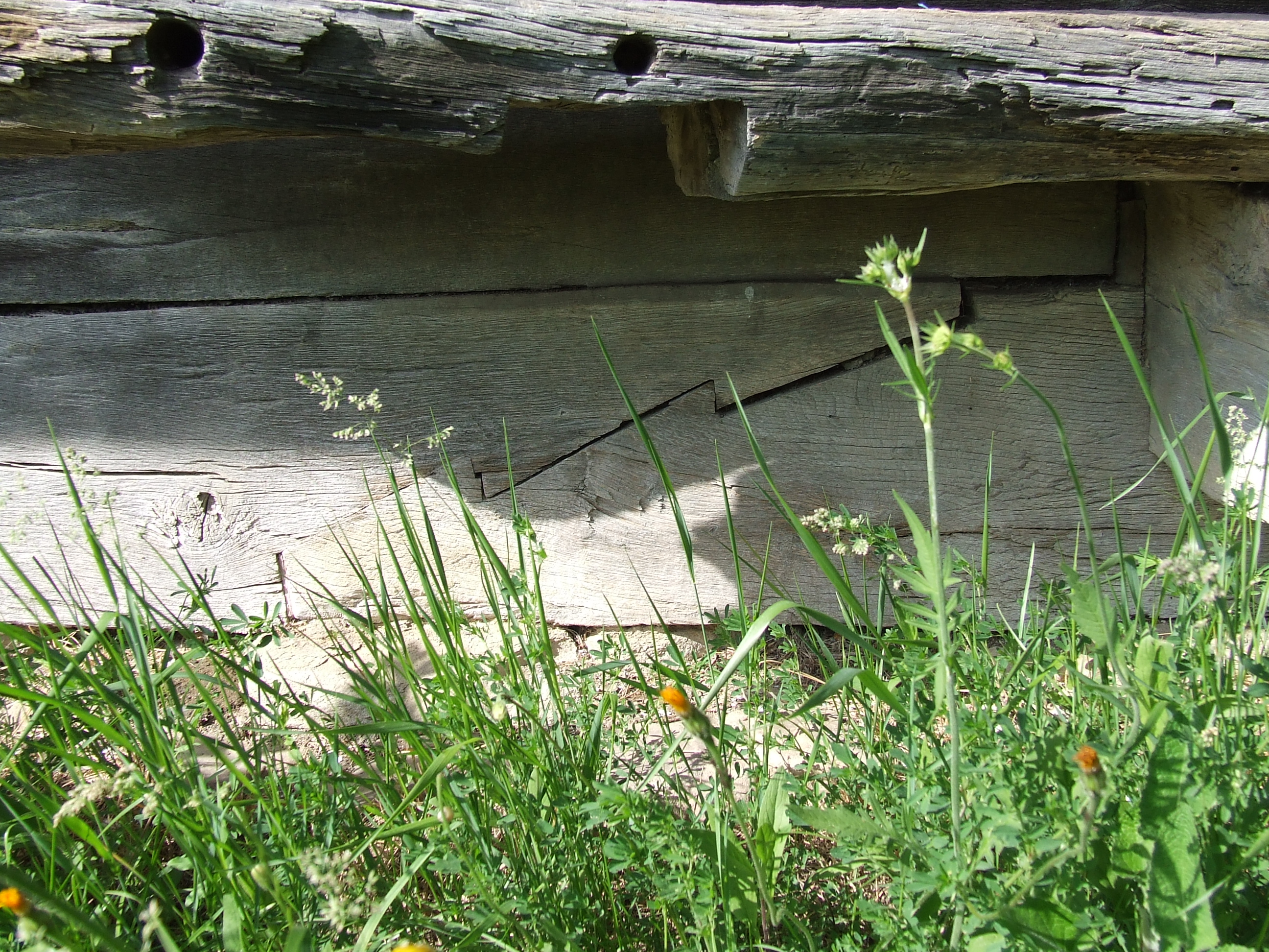 Biserica de lemn din Şardu. Talpa bisericii. Îmbinarea lemnului.